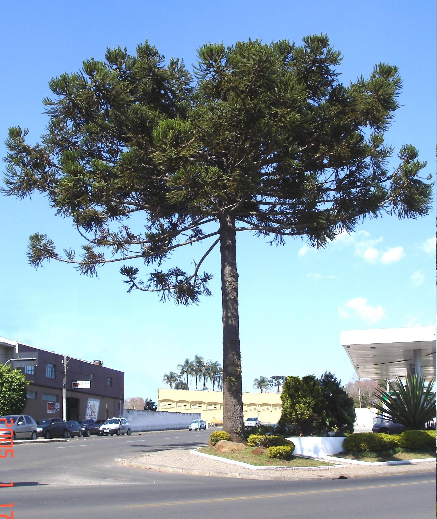 Araucaria augustifolia - pinheiro do Paraná - foto do usuário